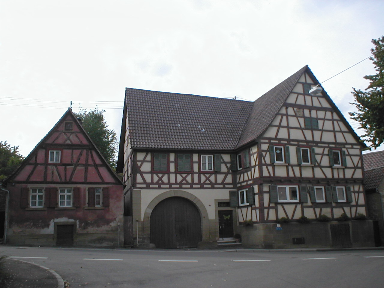 Historische Anwesen in Eppingen-Mühlbach, rechts der 1714 erbaute ehem. Gasthof „Schwarzer Adler“